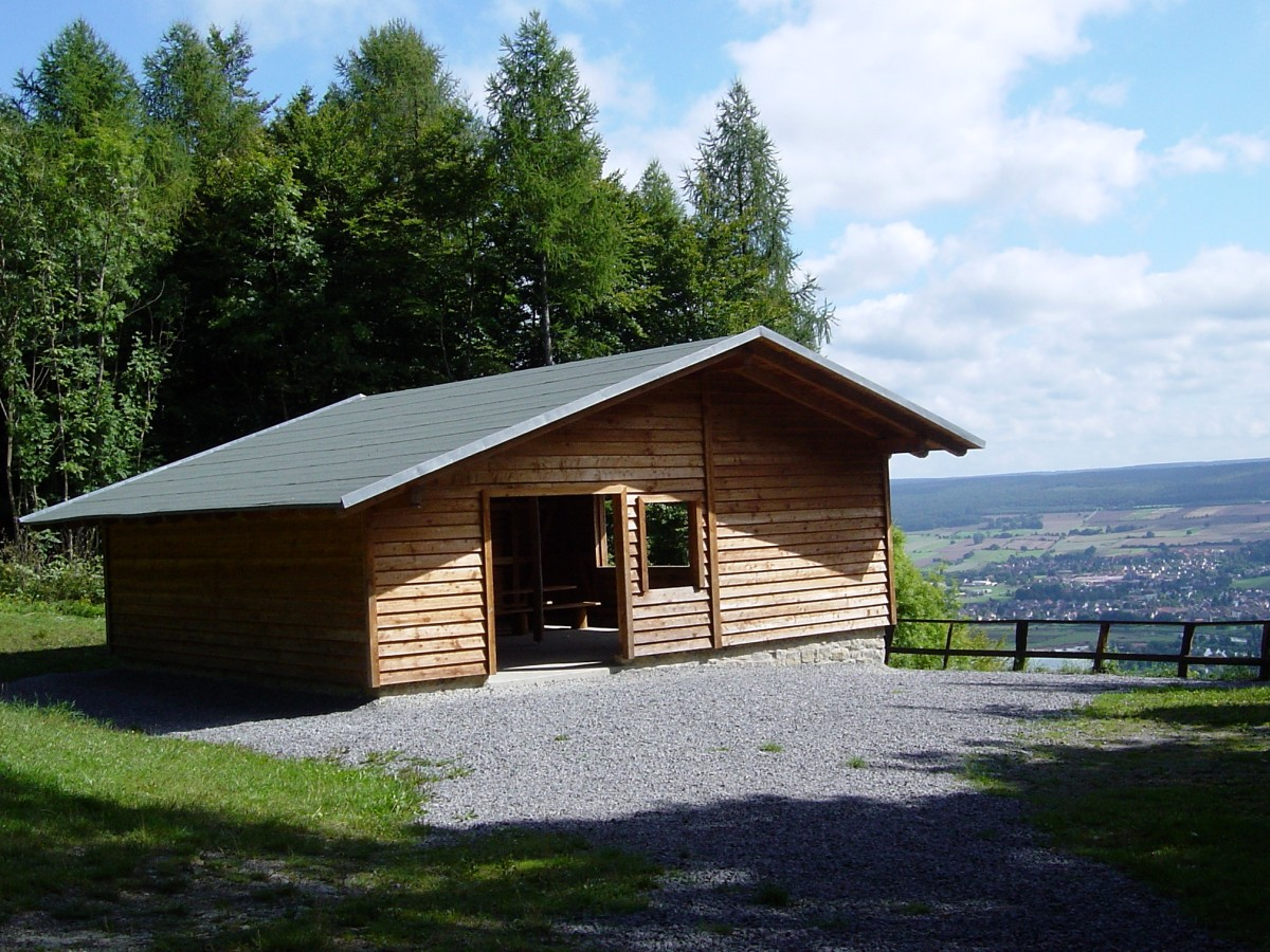 Brunsberghütte auf dem Brunsberg bei Höxter (Deutschland)